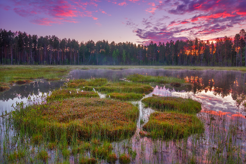 Заповедник «Кивач», Кондопожский район This image is related to the protected area of Russia number 1000032